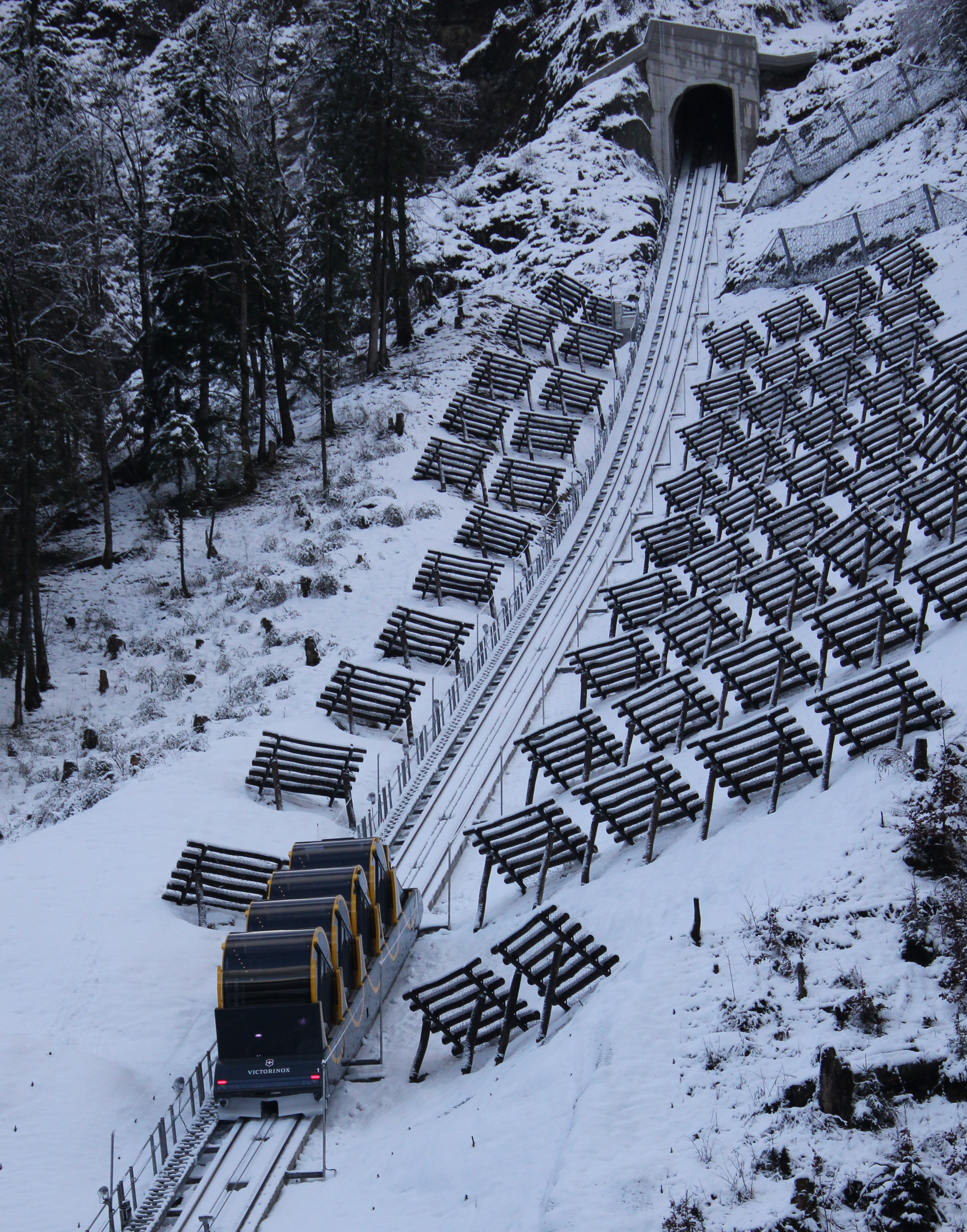 Fahrzeug der neuen Standseilbahn Schwyz-Stoos vor dem unteren Zingelifluhtunnel